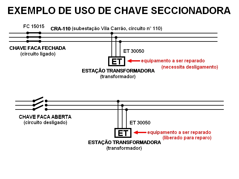 Exemplo do emprego de chave seccionadora em circuito primário trifásico usados em distribuição de energia elétrica. NOTA: este exemplo se aplica ao sistema de distribuição elétrica brasileiro de acordo com a NBR 15688 /2010- Redes de distribuição aérea de energia elétrica com condutores nus. Em outro países não se aplica.